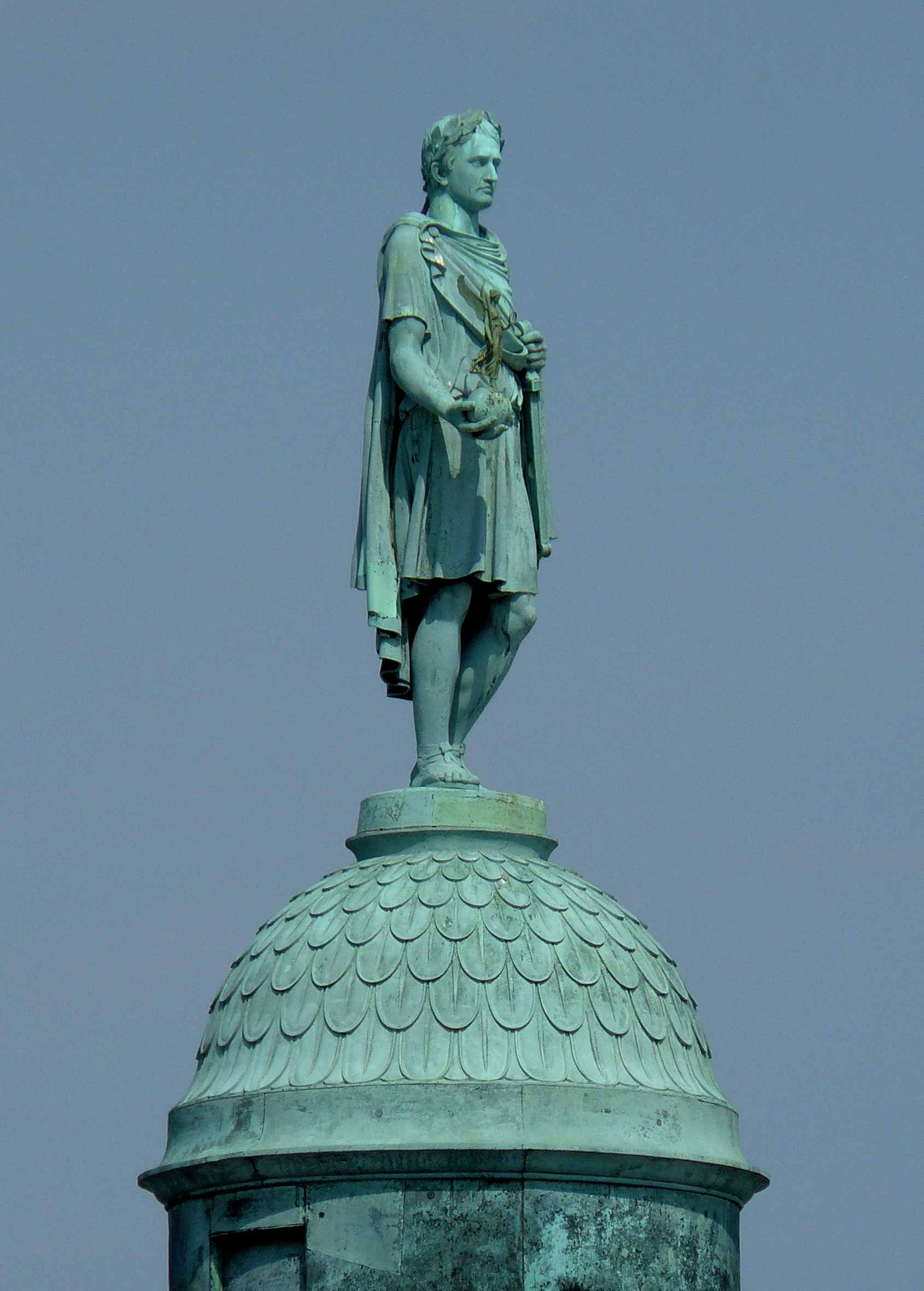 Statue sommitale de Napoléon Ier sur la colonne Vendôme à Paris - Augustin Dumont sculpteur - 1875